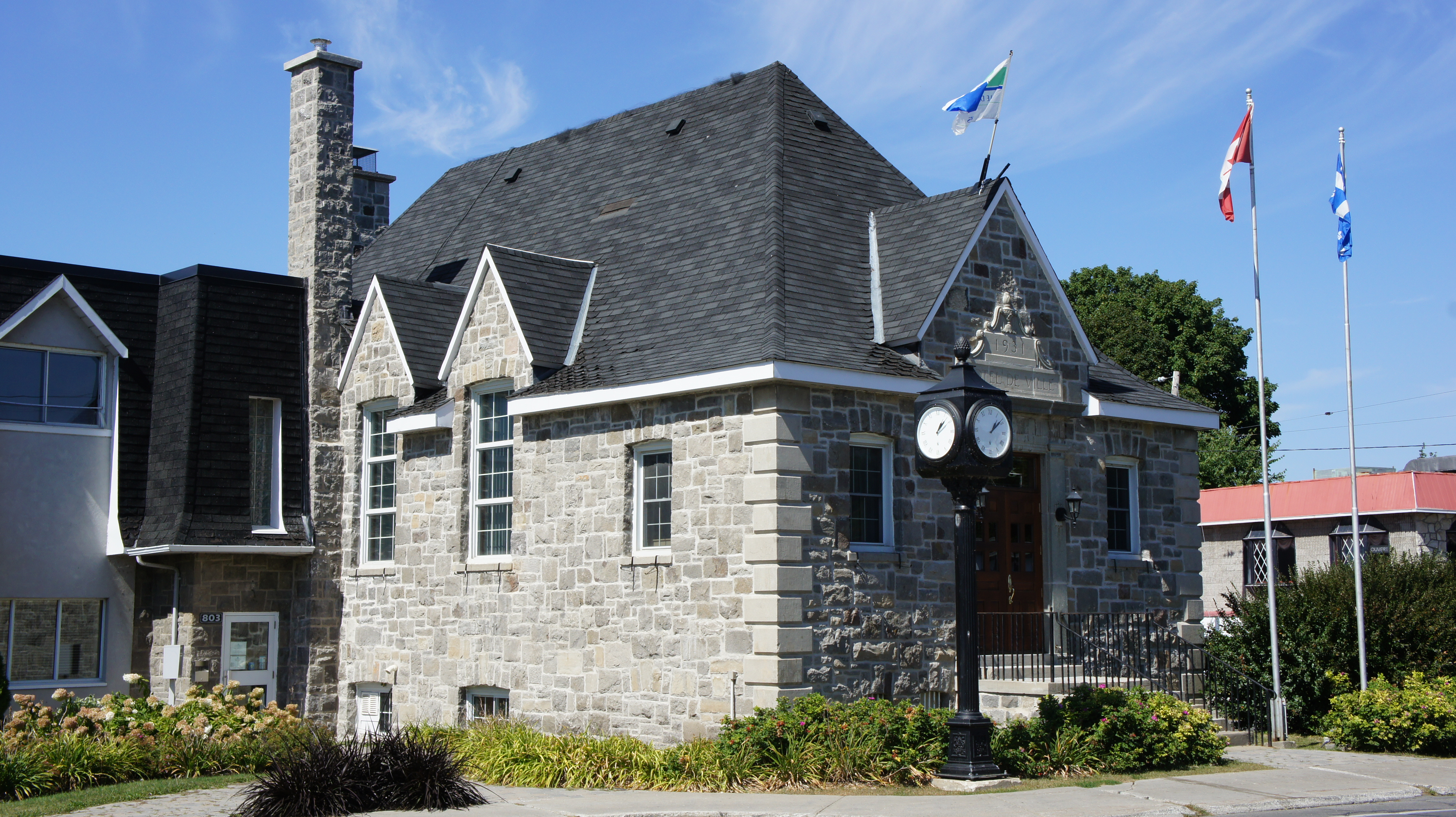 Site du patrimoine de l'hôtel de ville